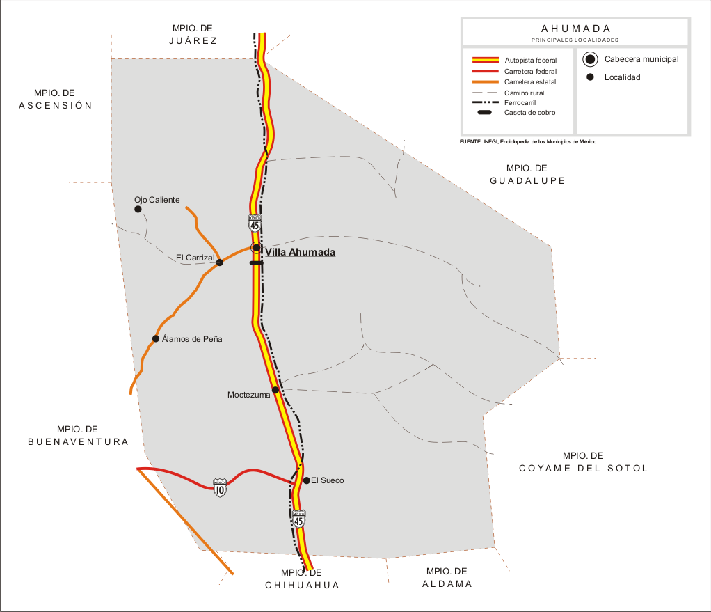 Mapa de las comunicaciones del Municipio de Ahumada en el estado de Chihuahua, México.